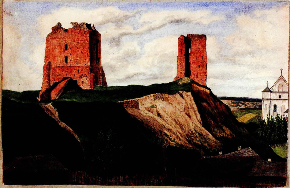 Беларуская (тарашкевіца): Наваградак (Navahradak), вуліца Кавальская (vulica Kavalskaja). Замак і Фара